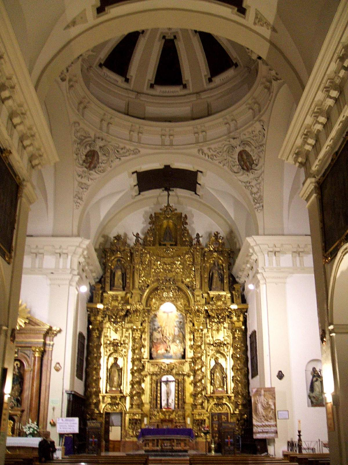 Iglesia de Nuestra Señora de Gracia (Trinitarios), en Córdoba, España